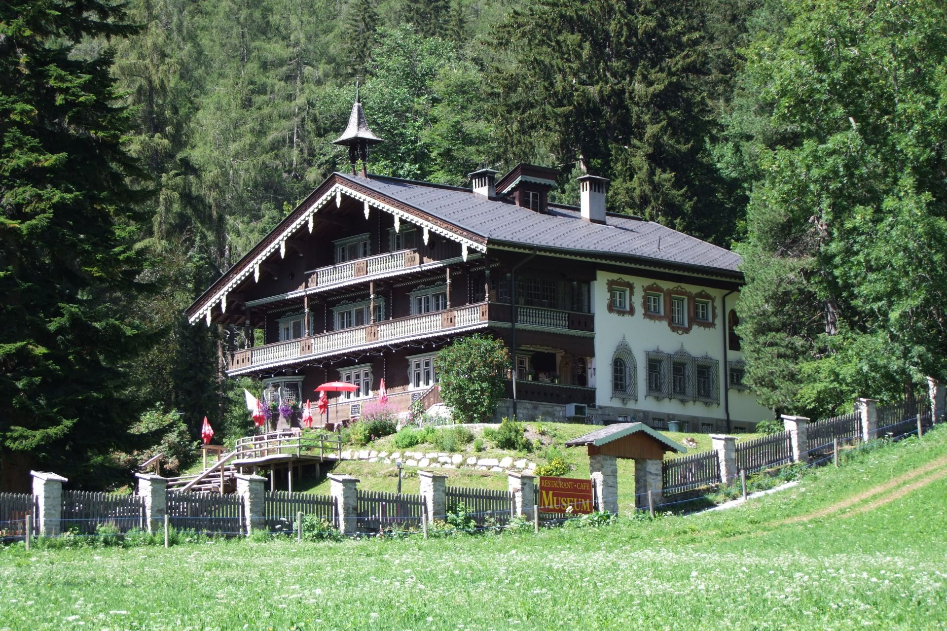 Trier-Villa, Skimuseum